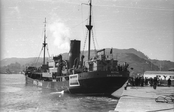 Mistral bakailao ontzia Pasaiako portutik ateratzen Ternuarantz. 1944-03-25